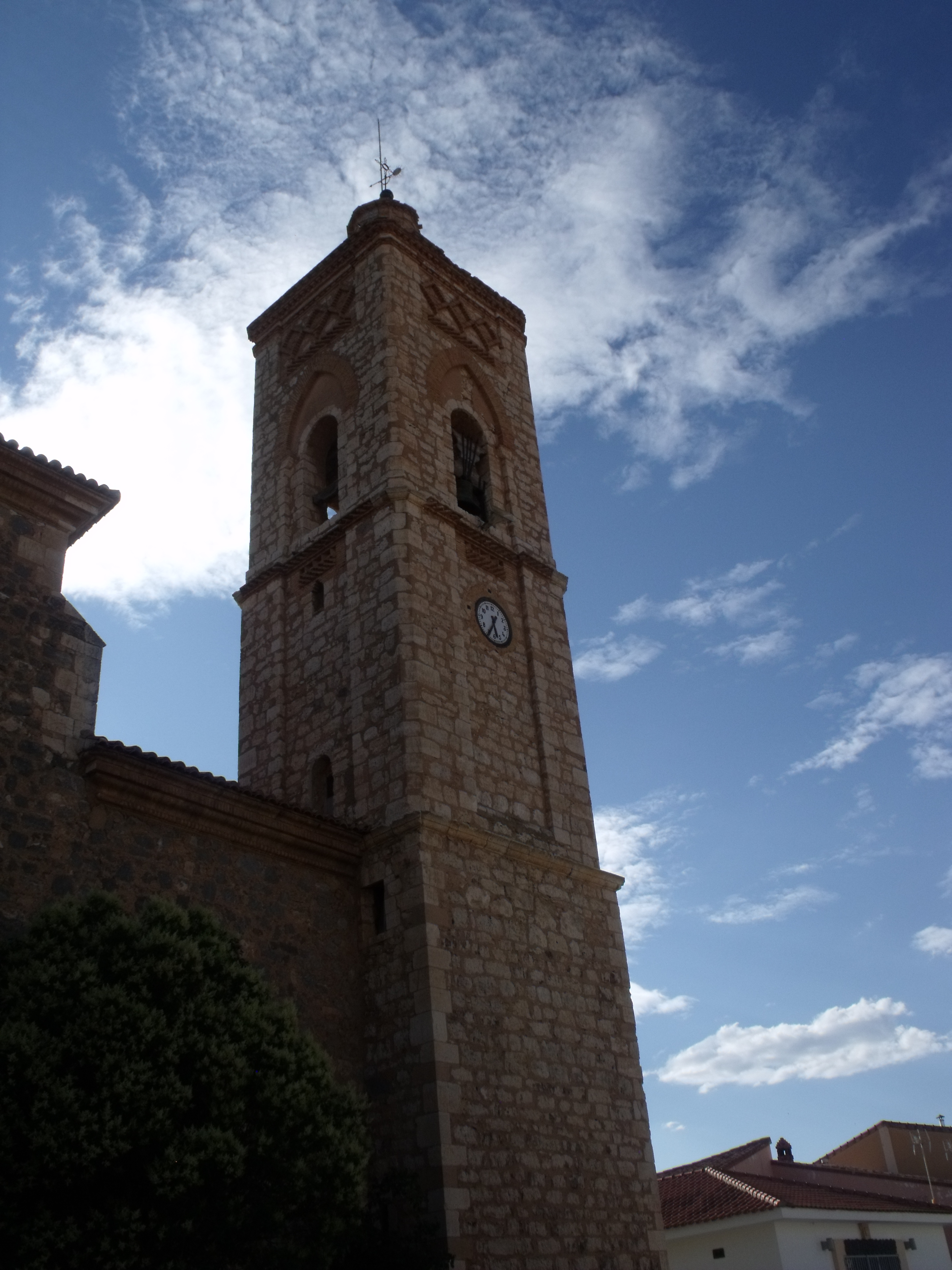 Campanario